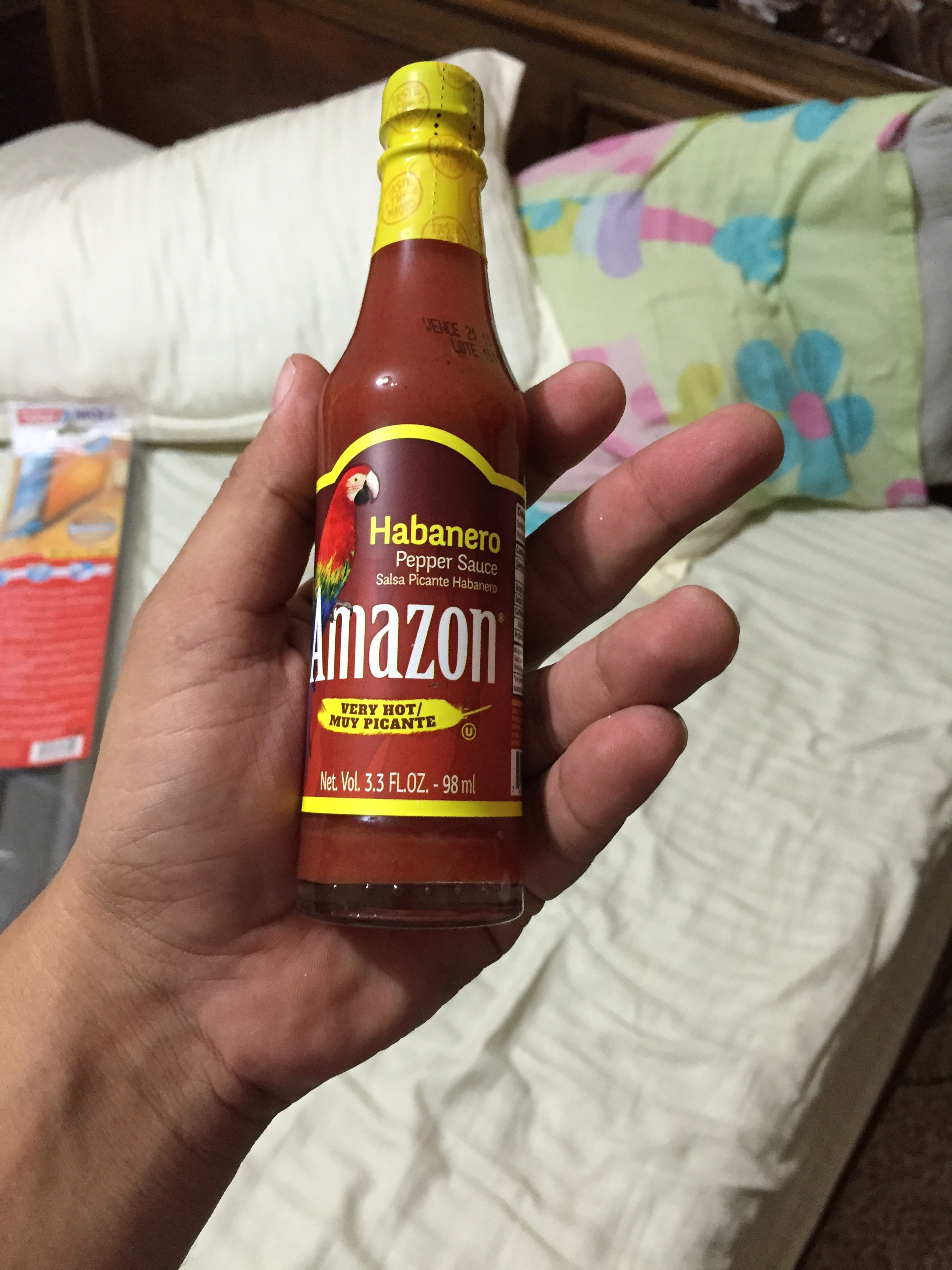 Salsa picante a base de ají habanero.